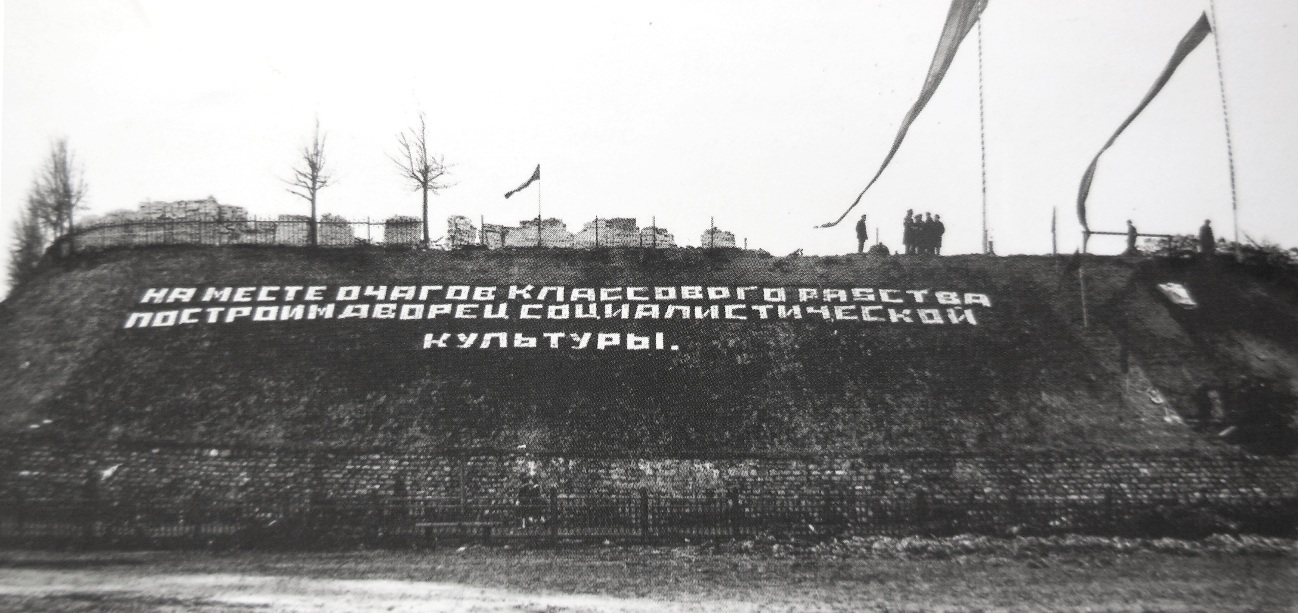 Иваново-Вознесенск. Место снесённых храмов. 1931 г.